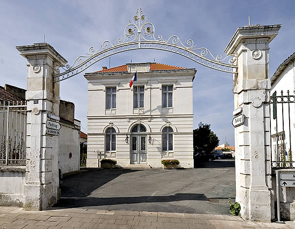 Mairie de Sainte-Marie-en-Ré, Ile de Ré, Foto von User:fr:Pep.per Hochgeladen von User:Ile-de-re